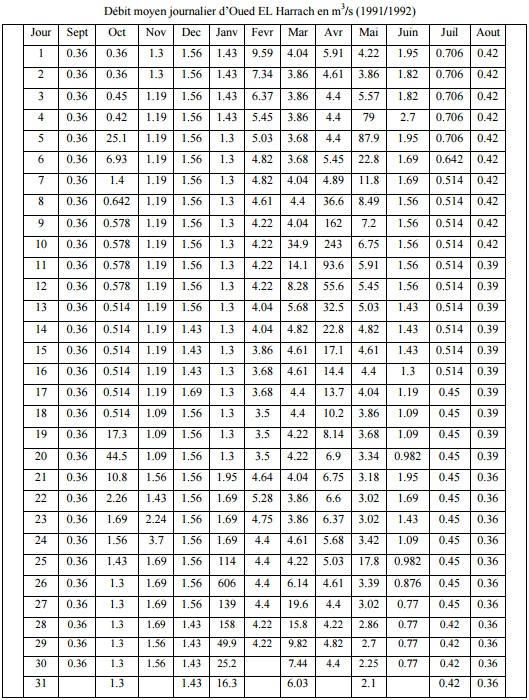 Débit journalier de Oued El Harrach